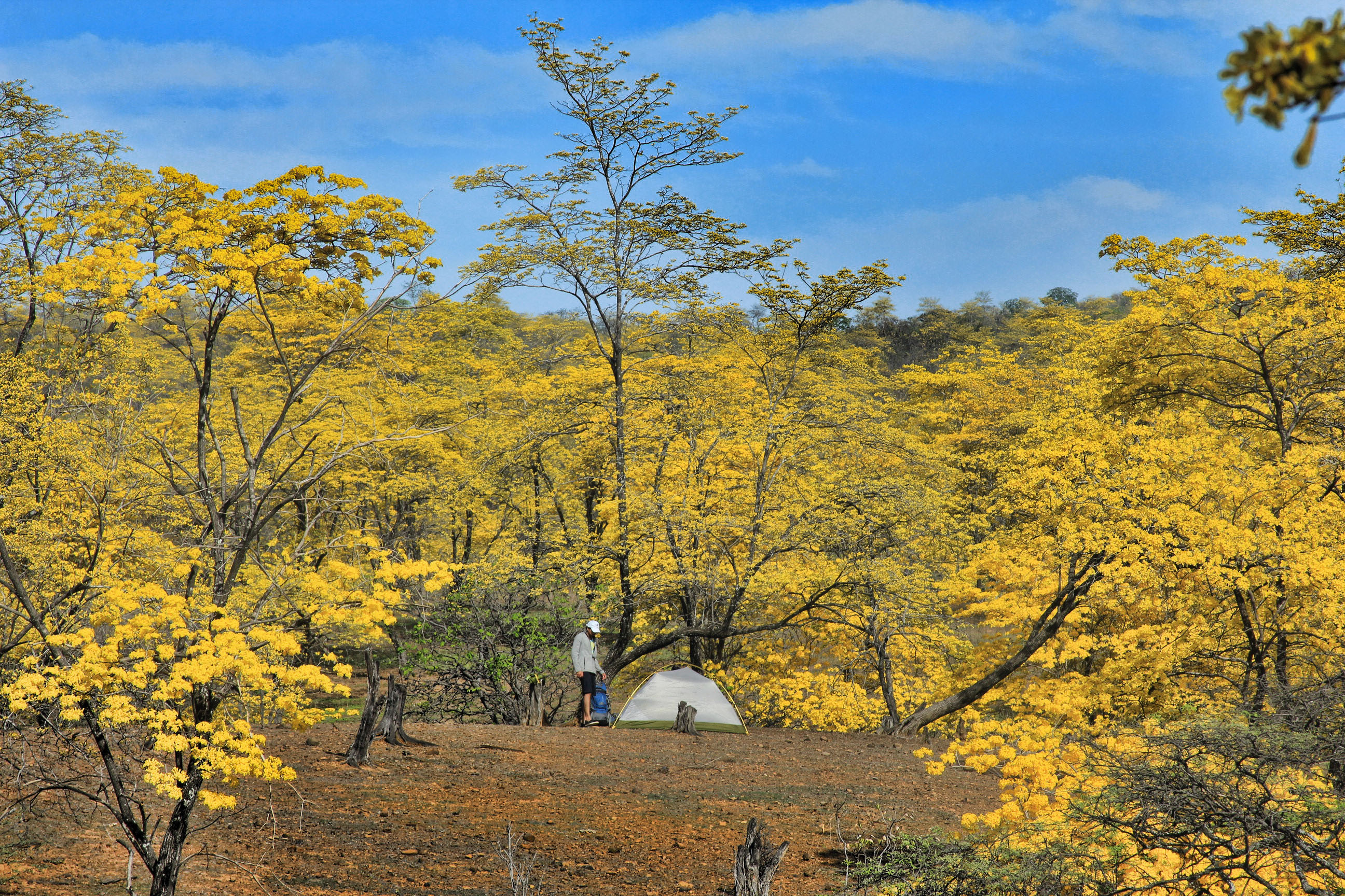 Florecimiento de los Guayacanes - domingo